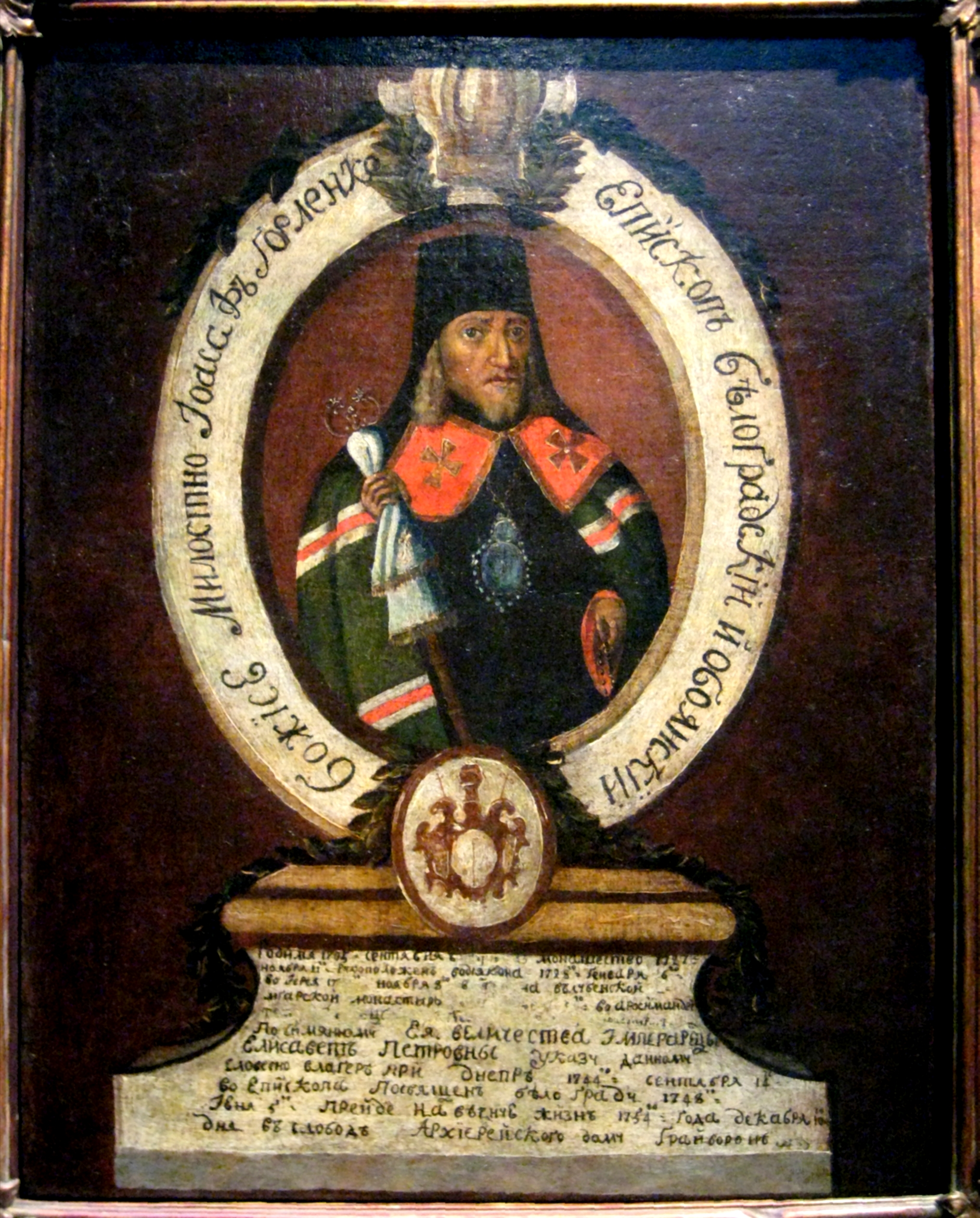 Неизвестный художник конца 18 - начала 19 века. Портрет святителя Иоасафа Горленко (Белгородского). ГИМ.